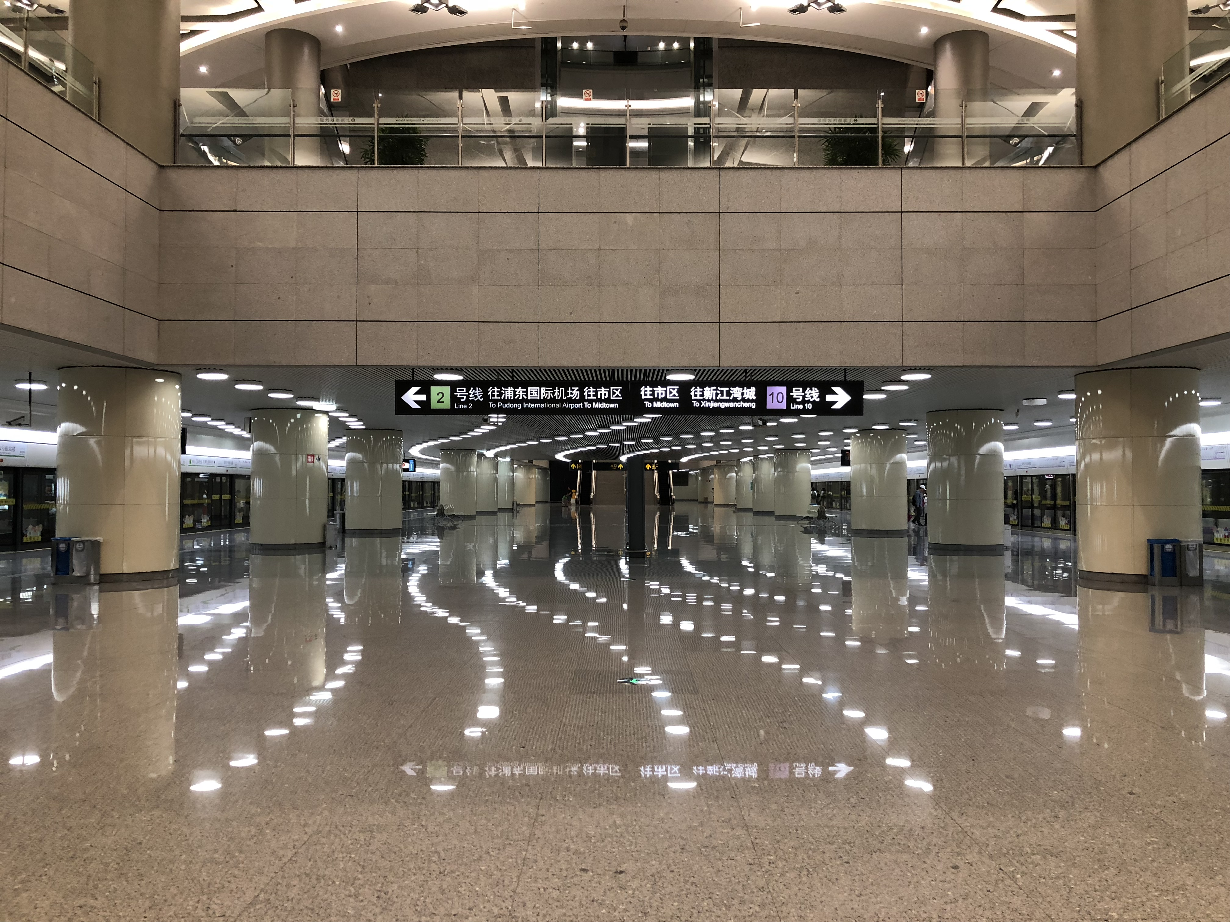 中文（中国大陆）: 虹桥2号航站楼站